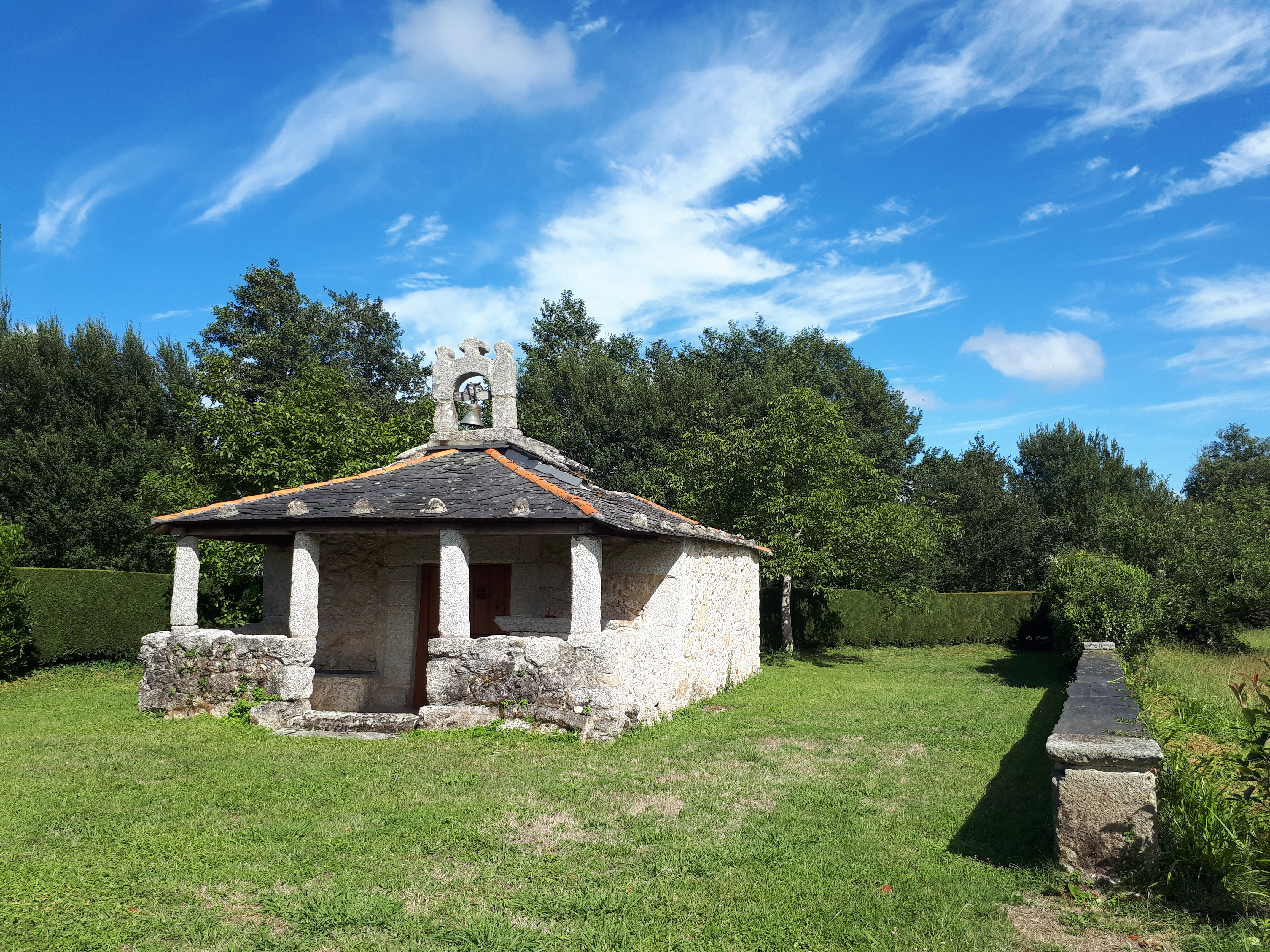 Capela fundada por José Maseda Río y Mos no 1709.